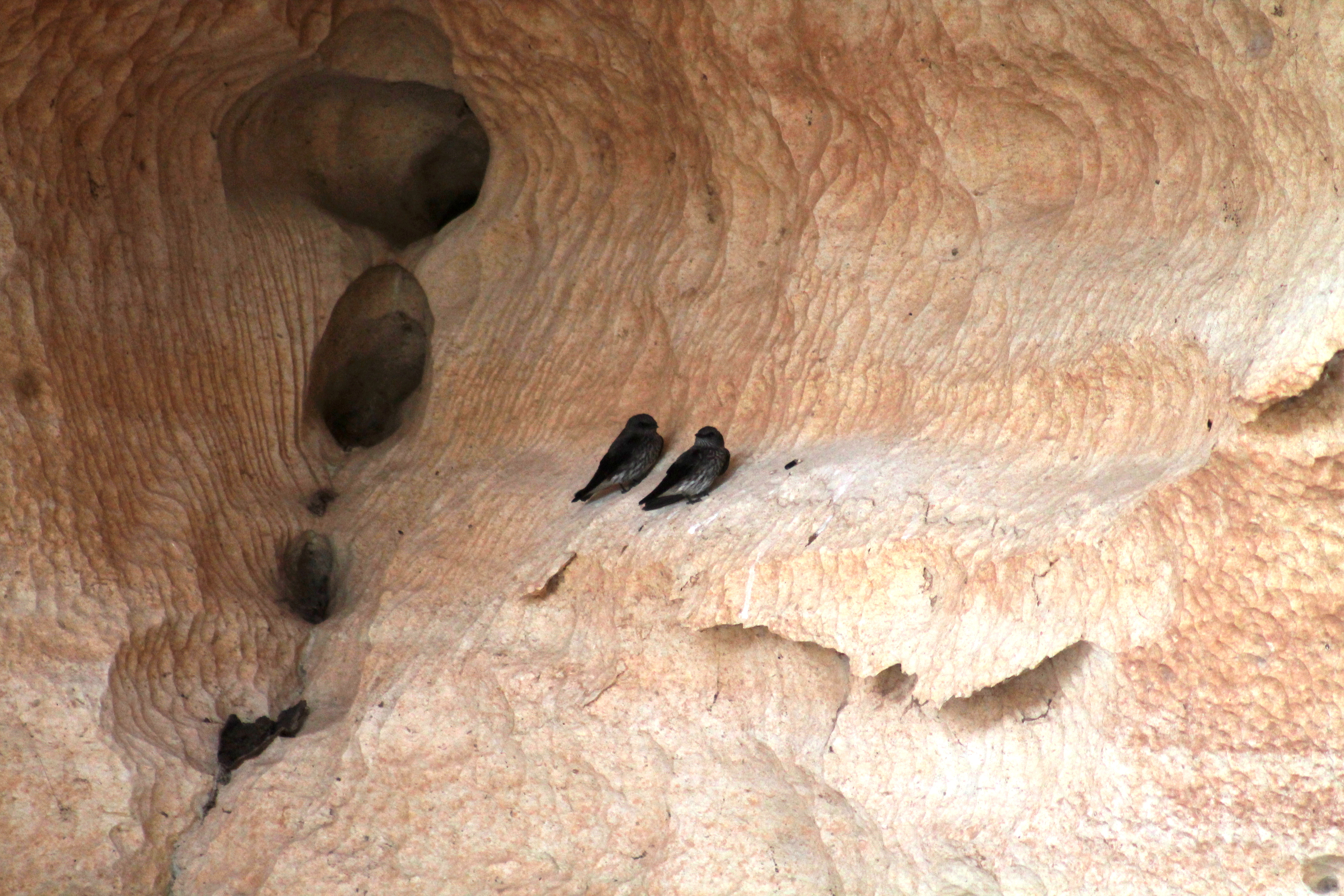 Maskarenenzwaluw langs de Manambolo